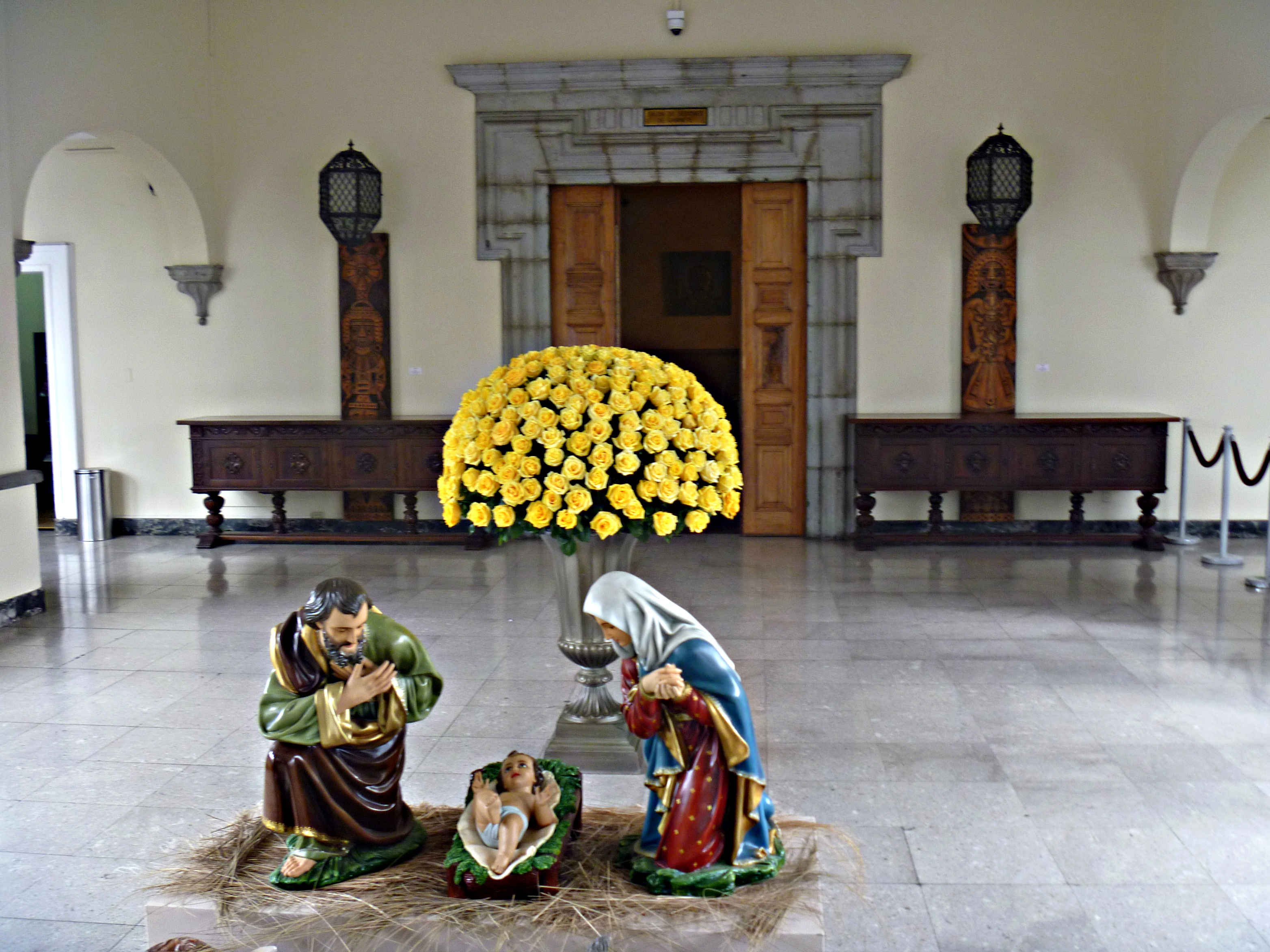 Área del vestíbulo del segundo piso del Palacio de Carondelet, al que se accede inmediatamente después de subir la Escalera de Honor.